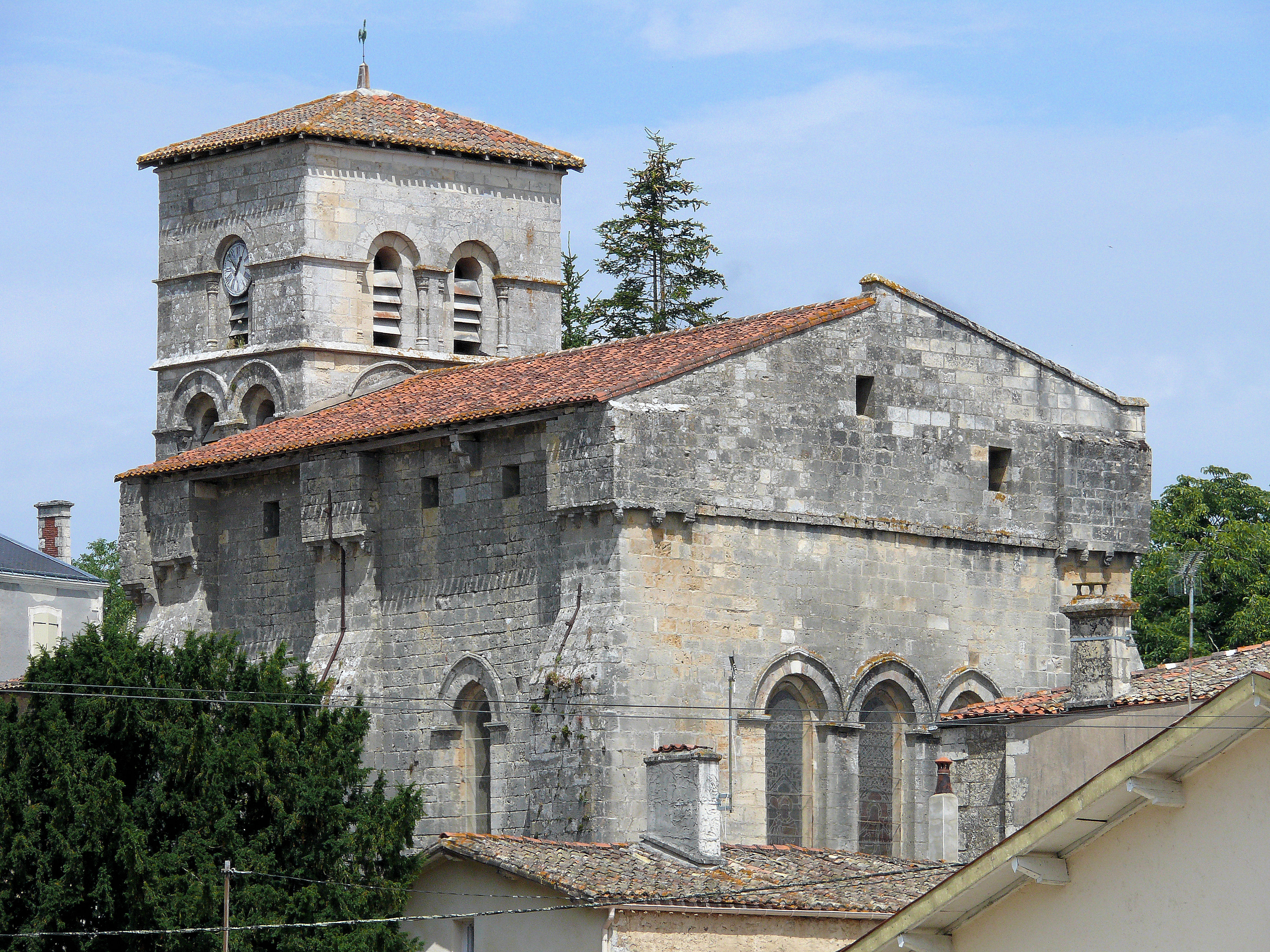 Augé - Eglise Saint-Grégoire